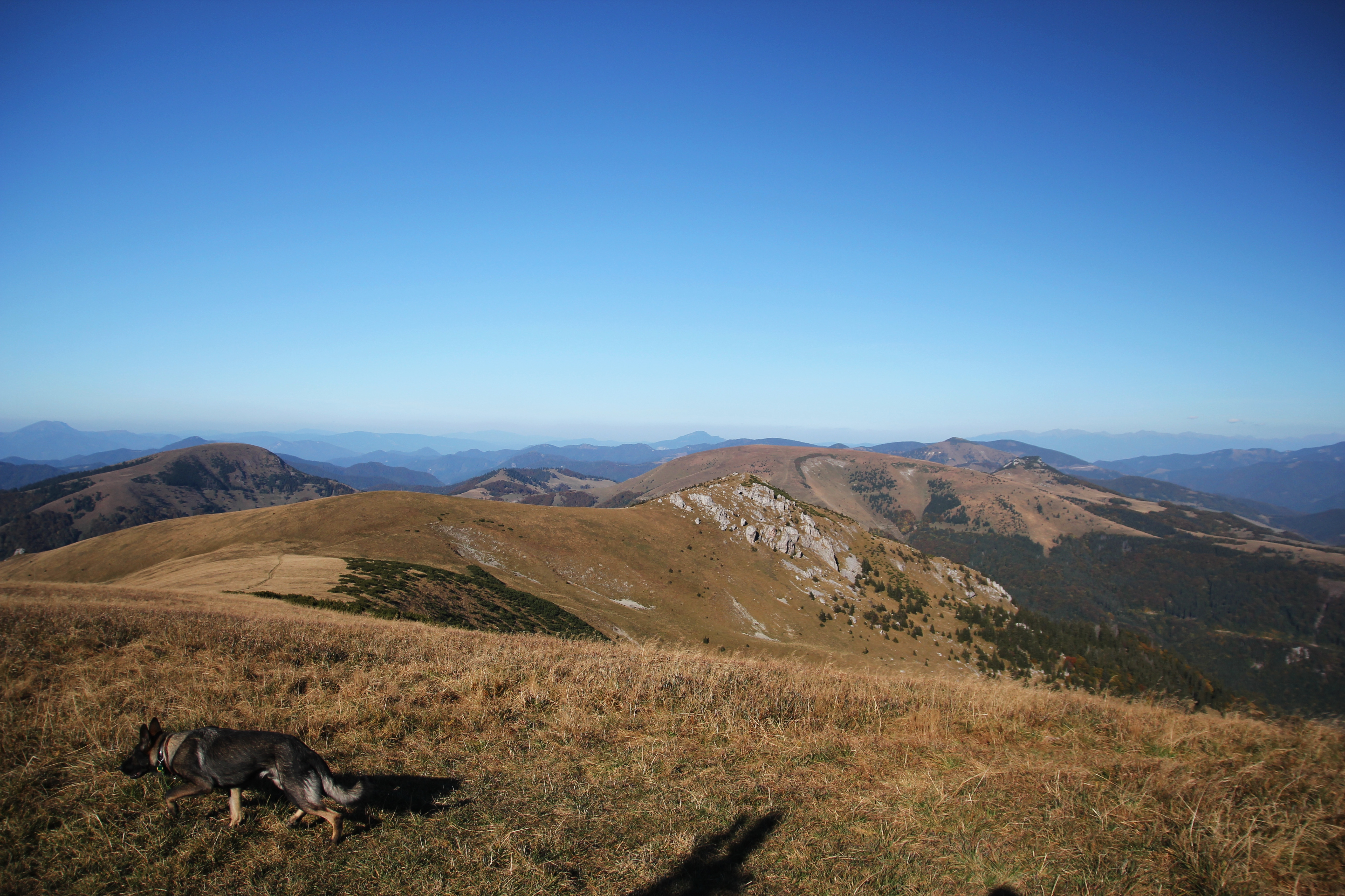 Suchý vrch a hrebeň z Ostredku